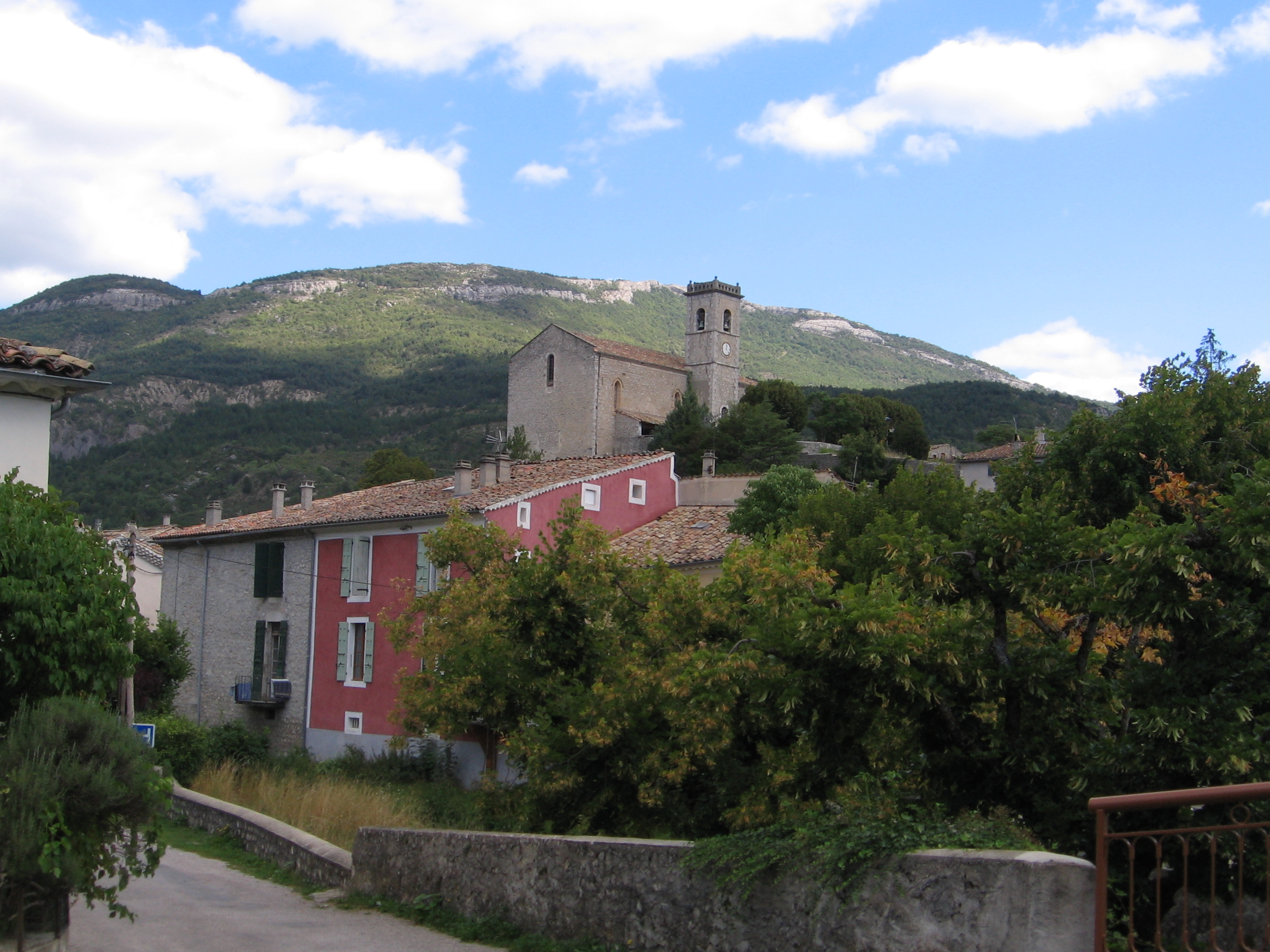 la_Motte_Chalancon, France